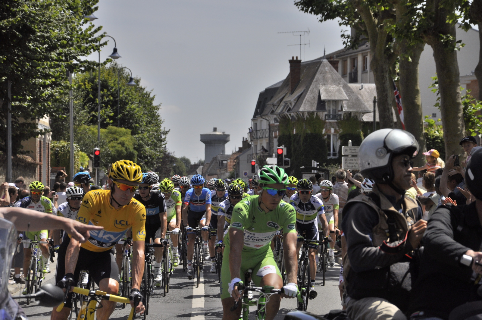 Premiers coureurs, avant le départ réel. De gauche à droite : Bradley Wiggins, Peter Sagan et Thomas Voeckler.